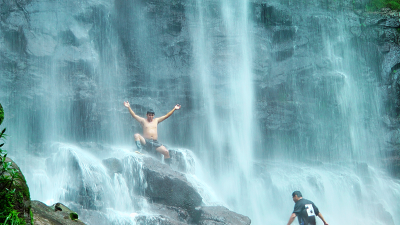 Chorrera en Bélgica